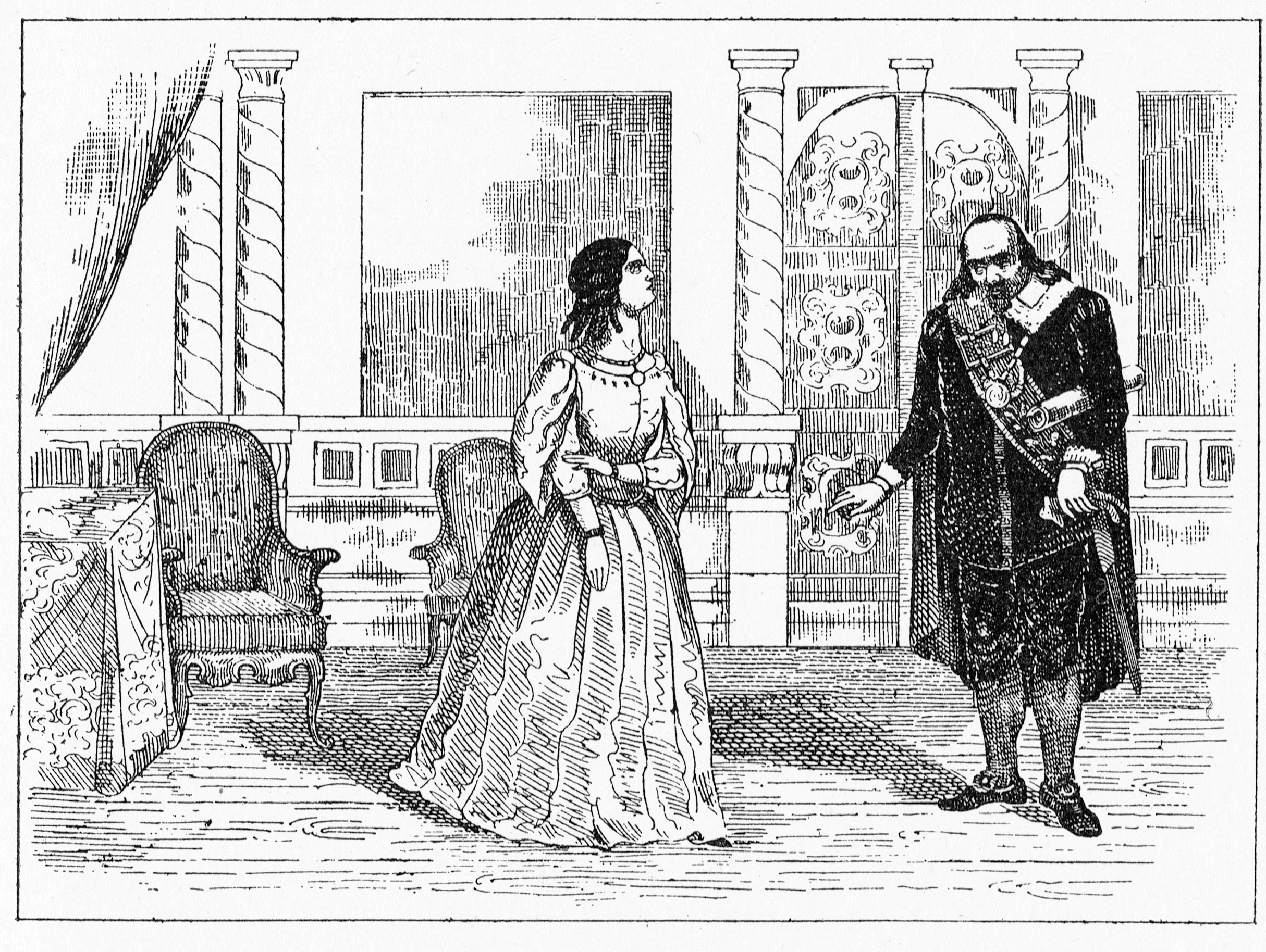 Drottning Kristina. Play by Jeanette Stjernström. Ulrika Kindahl as Kristina. Ulrik Torsslow as Axel Oxenstierna.